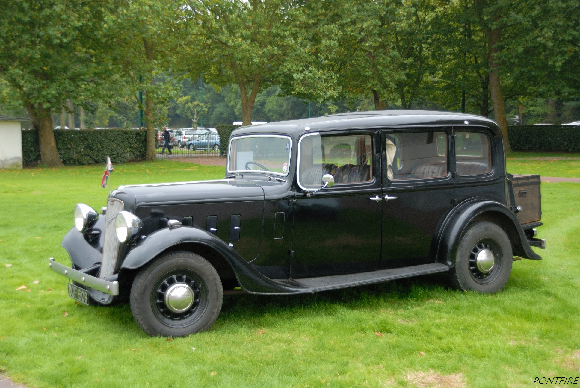 1936 Austin Eighteen Chalfont Le Club de l'Auto 47ème rallye Paris Deauville 2013